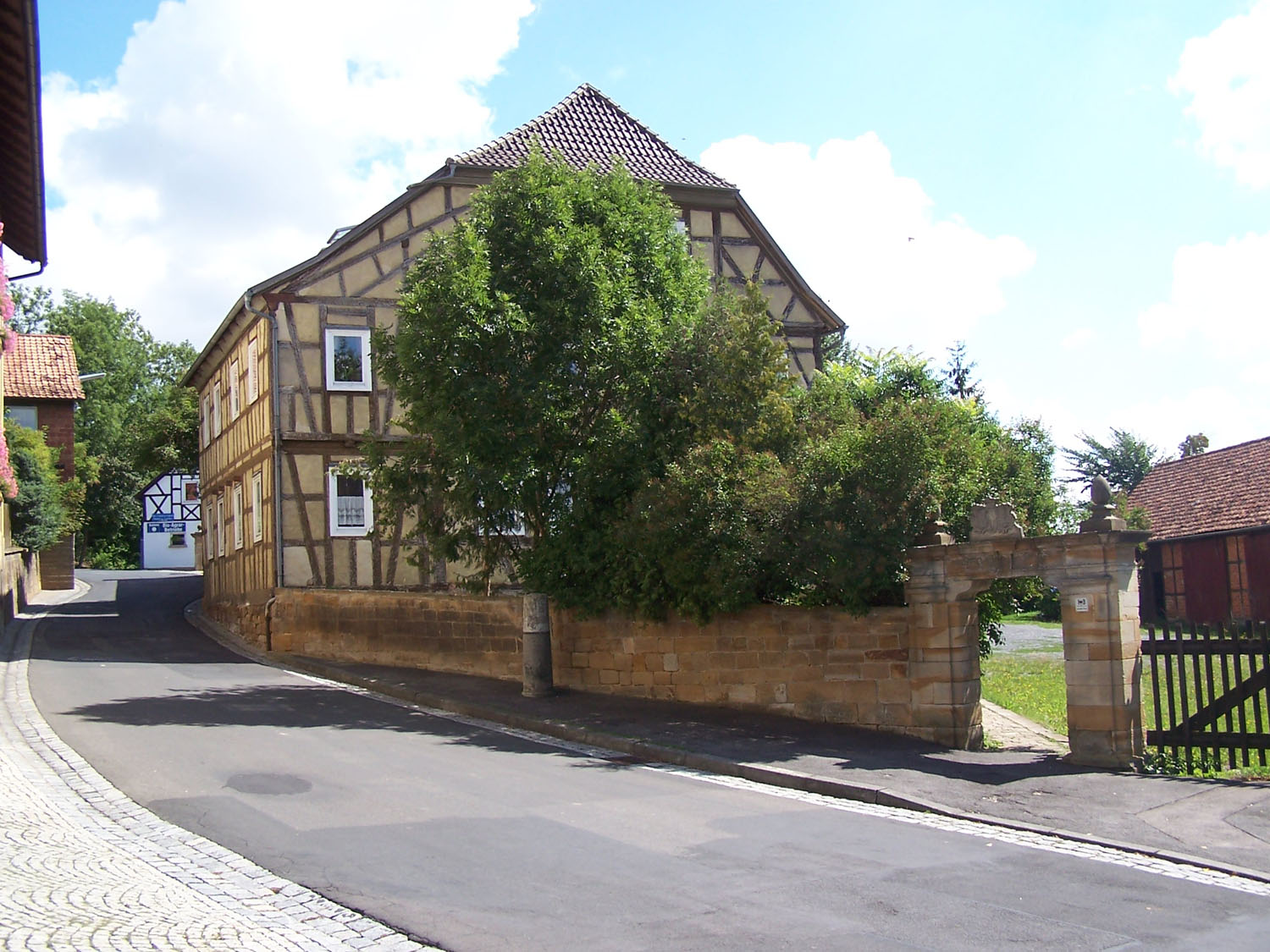 Höchheim Bibra manner house